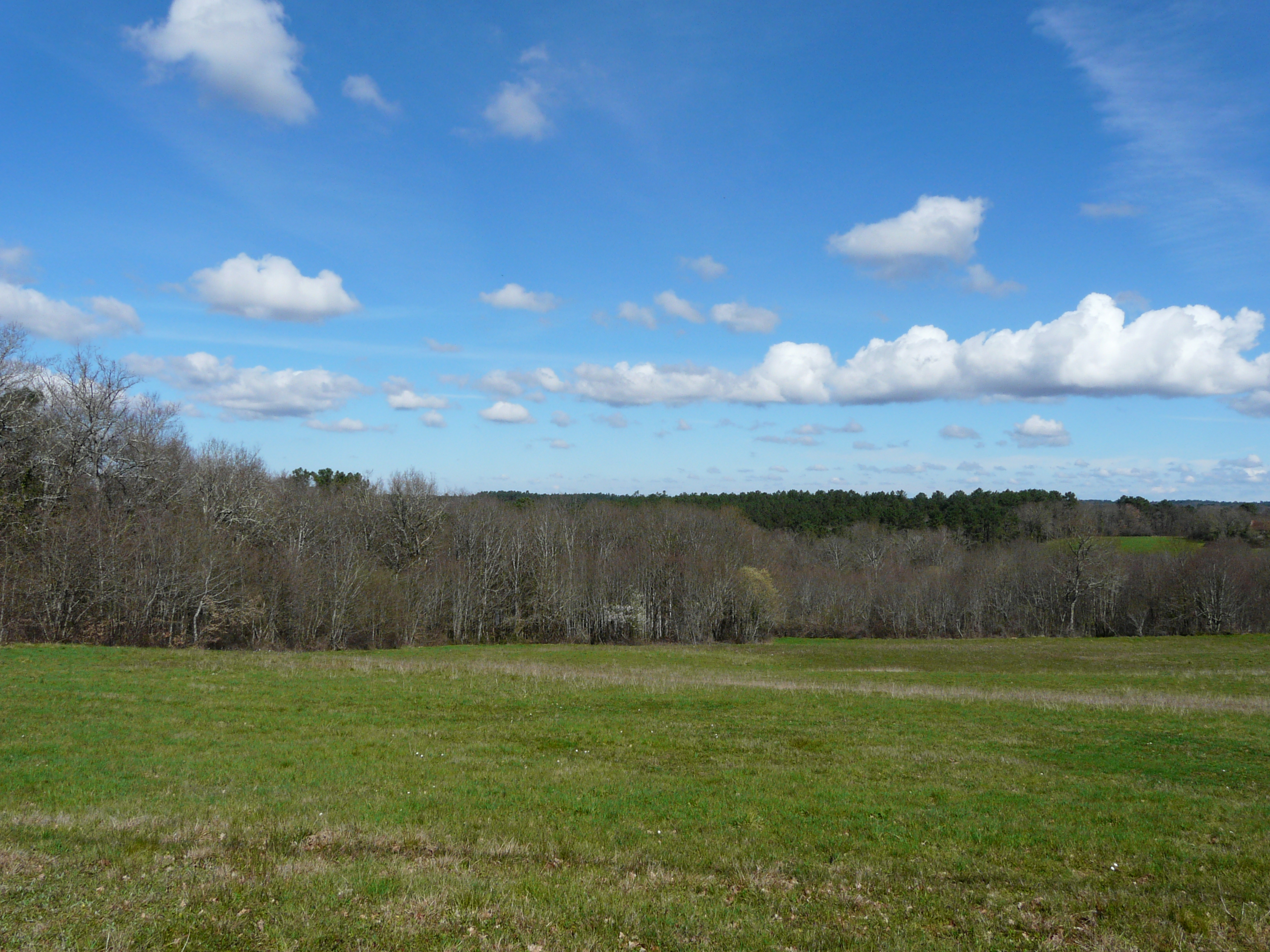 La forêt de la Double au nord du hameau de Saint-Étienne-de-Puycorbier, Dordogne, France.